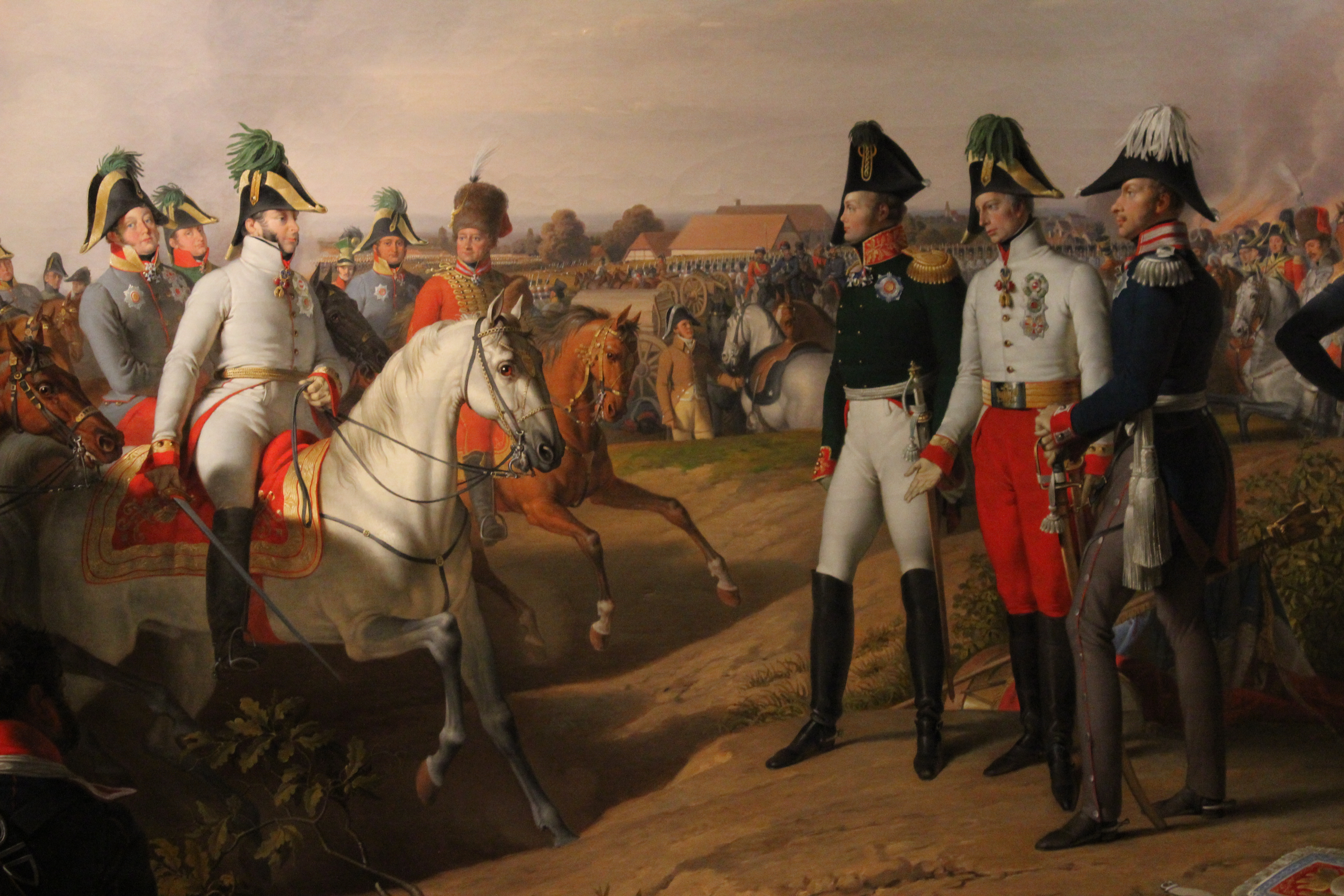 Berlín, Deutsches Historisches Museum. Batalla de Leipzig, por Johann Peter Krafft.